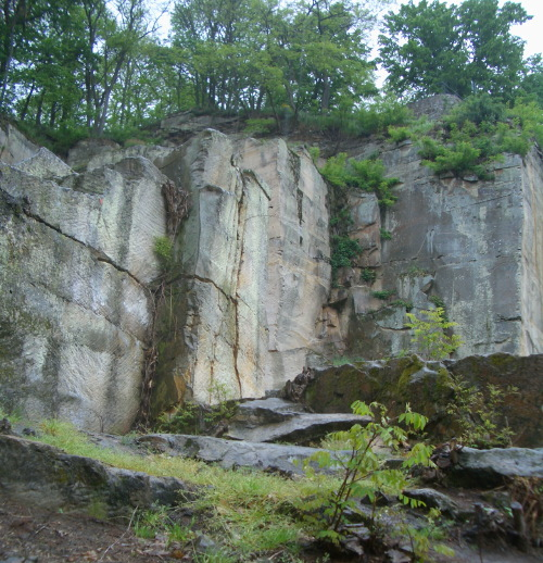 Bildbeschreibung: Steinbruch Kriemhildenstuhl, Fotograf/Zeichner: Benutzer:Yak Datum: Mai 2005 Sonstiges